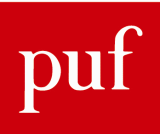 Logo des Presses universitaires de France (2012)